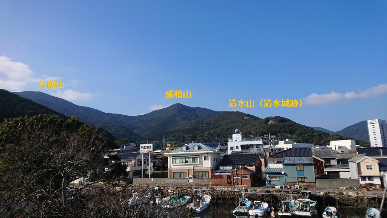 長崎県対馬市厳原町にある3つの山 紹介つき